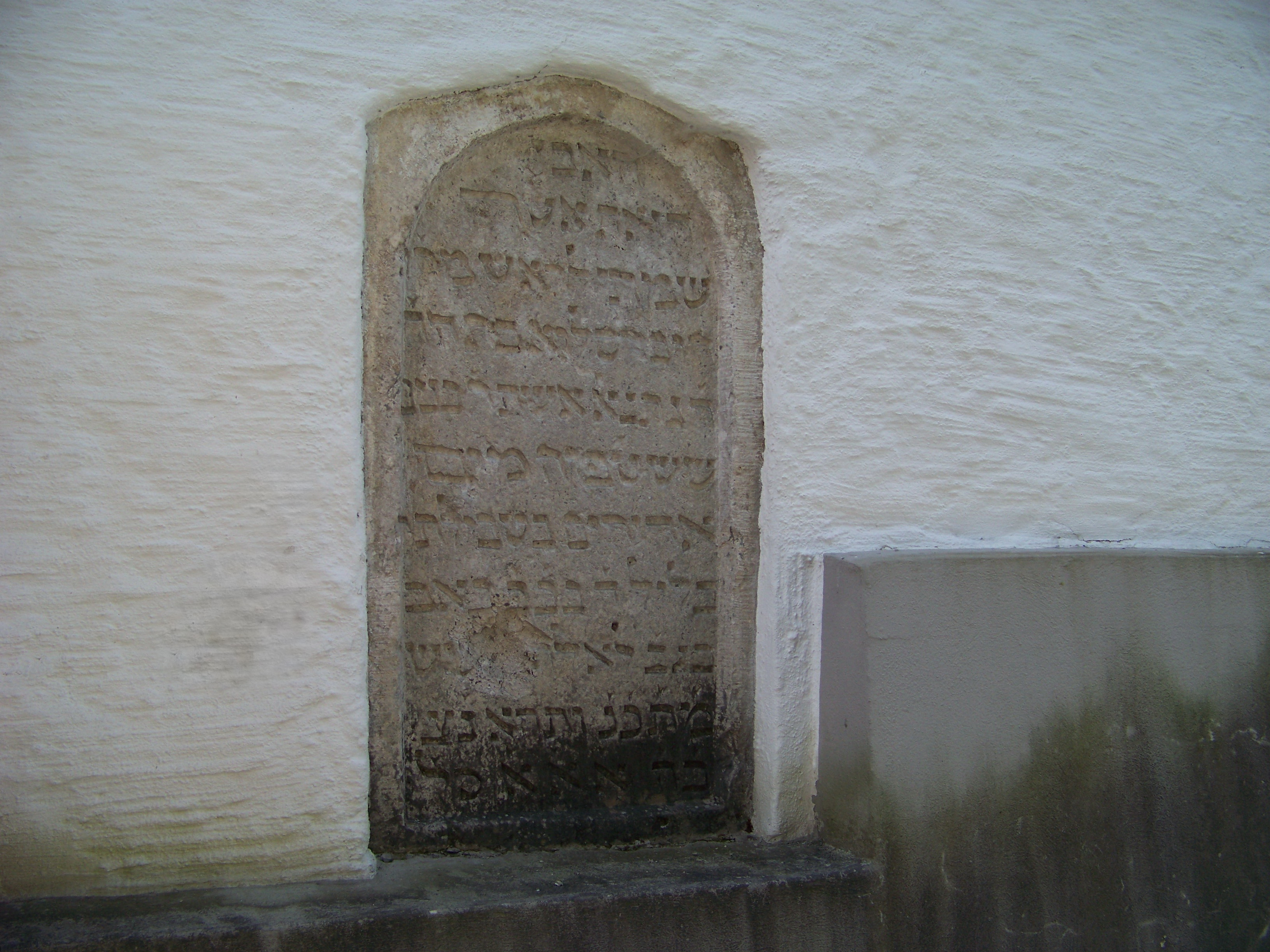 Thalmassing, Wolkering. Rechts vom Friedhoftor ist in der aus dem 18. Jahrhundert stammenden Friedhofmauer der jüdische Grabstein aus Kalkstein für Barsilai aus dem Jahre 1292 eingelassen. Die Inschrift lautet übersetzt: "Das ist der Stein, den ich gesetzt habe zu Häupten der Frau Barsilai, der Tochter des Rabbi Nathaniel, der Ehefrau des Rabbi Bunim, welche die mächtigen Wasser weggeschwemmt haben, als sie badete in der Nacht zum vierten Tage am 22. Aw im Jahre 5052. Ihr Tod möge eine Sühne für ihre Seele sein, und sie werde selig - Amen." Das Datum jüdischer Zeitrechnung entspricht einem Augusttag des Jahres 1292 n. Chr. Sandstein H. 1,20 m, Br. 0,45 m. Transkription duch H. Rabbiner Dr. Werner, München. Quelle: Die Kunstdenkmäler von Bayern, Bezirksamt Regensburg, Ausgabe 1910, Seite 204.